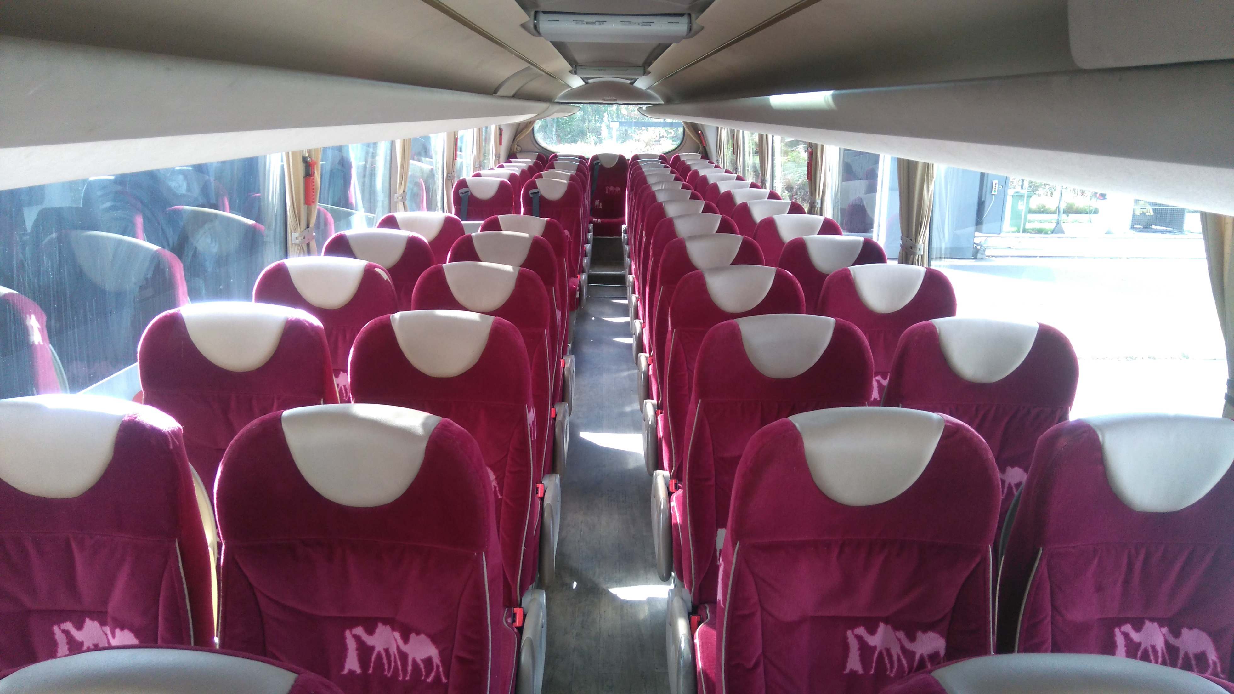 Irisbus Magelys HD - Transdev - Intérieur